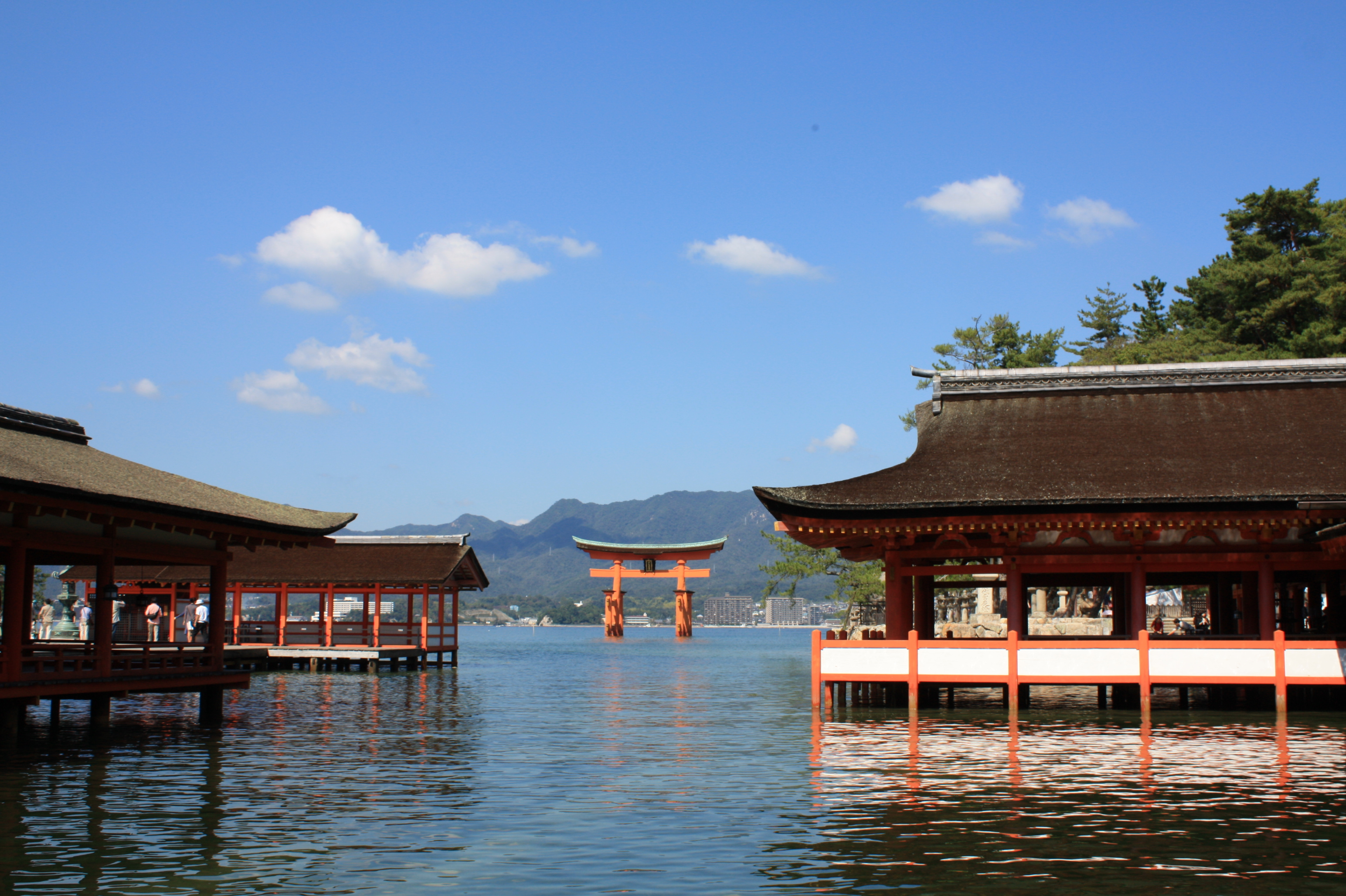 厳島神社から大鳥居を撮影